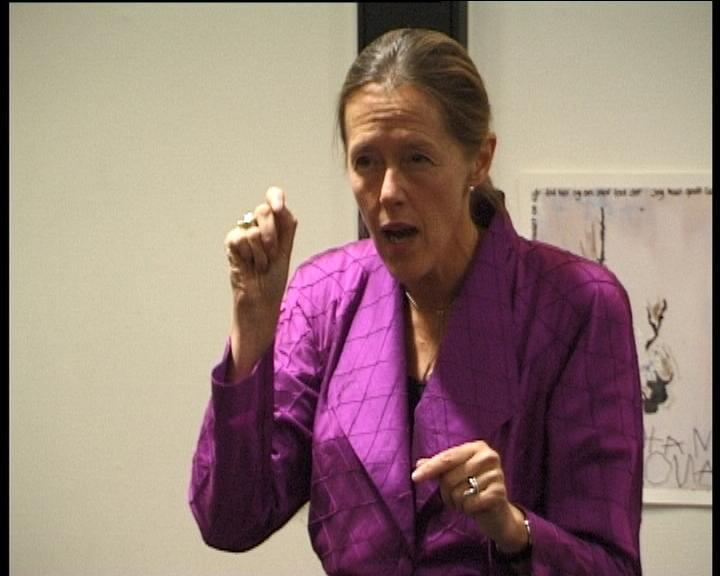 Dorte Futtrup. Værløse Kulturhus. 2004